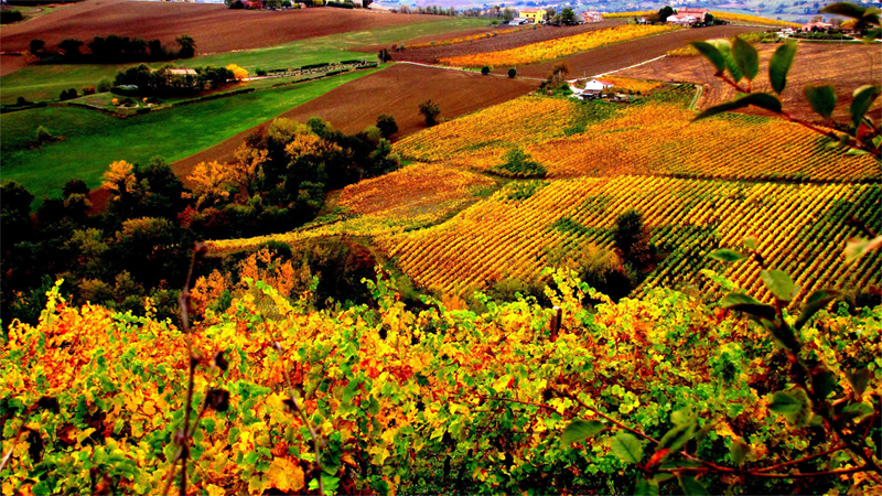 Campagna montecarottese in autunno